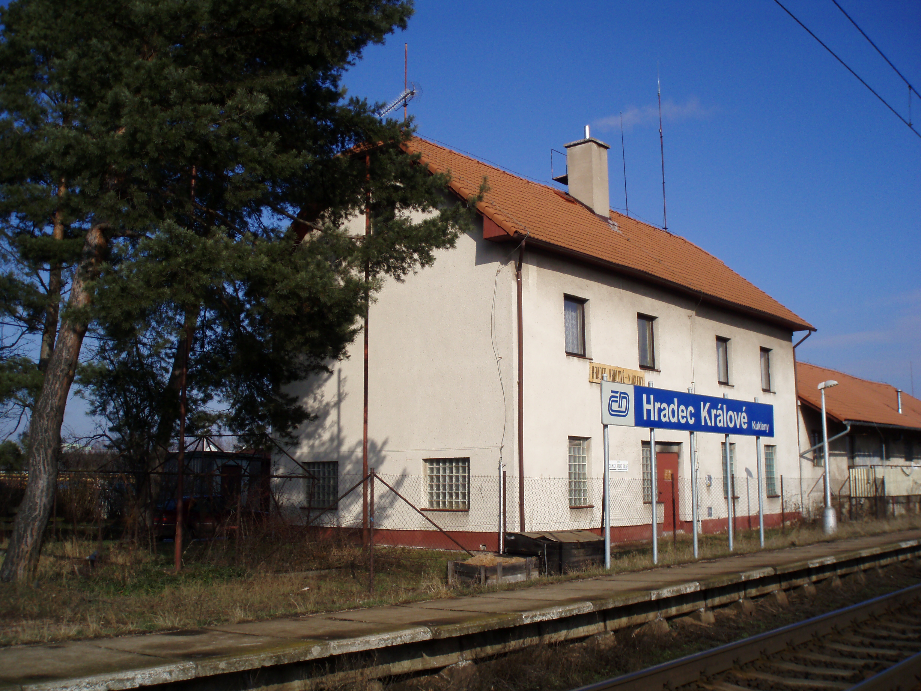 Železniční zastávka Hradec Králové-Kukleny.